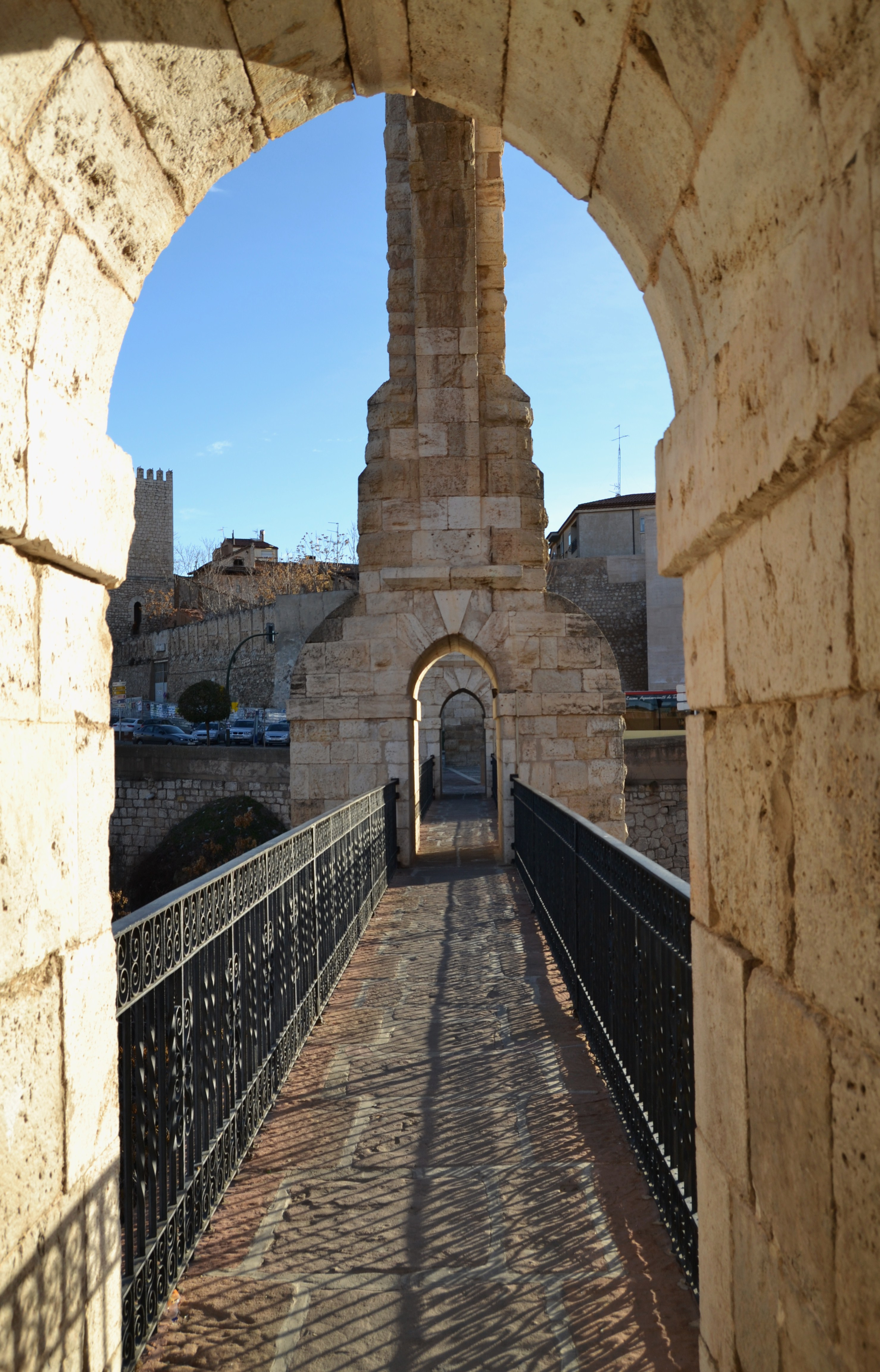 Pont de l'aqüeducte de Los Arcos de Terol.